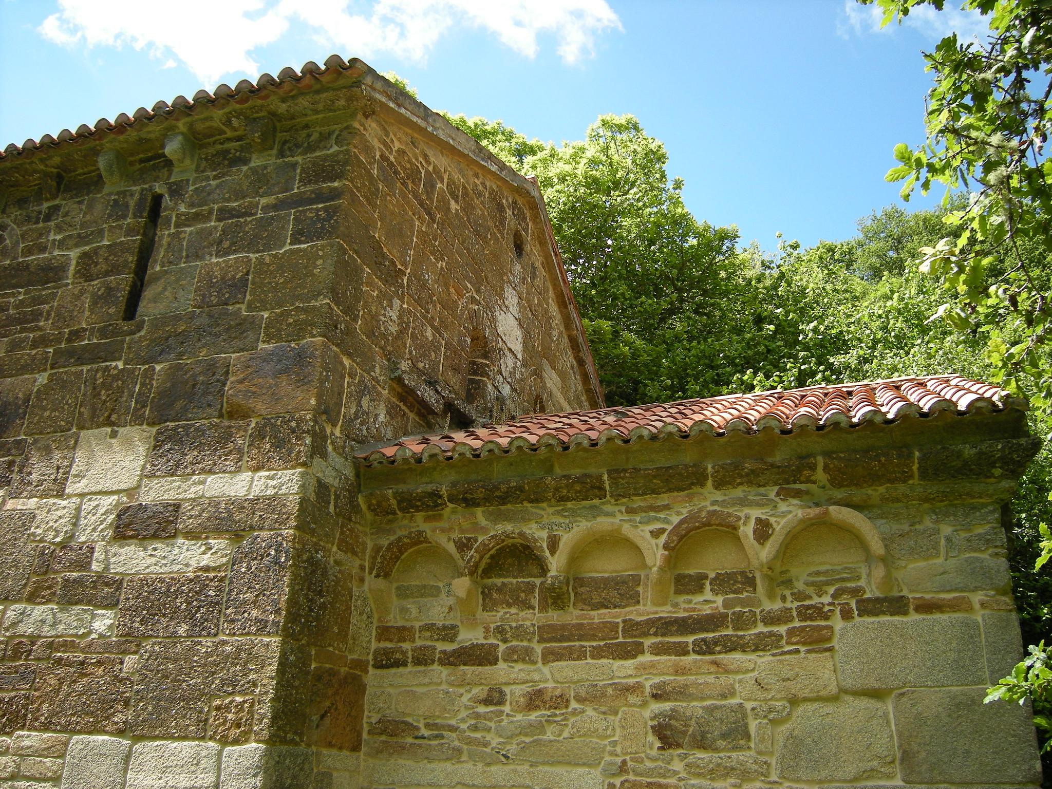 gl: Igrexa prerrománica de Santo Antolín de Toques